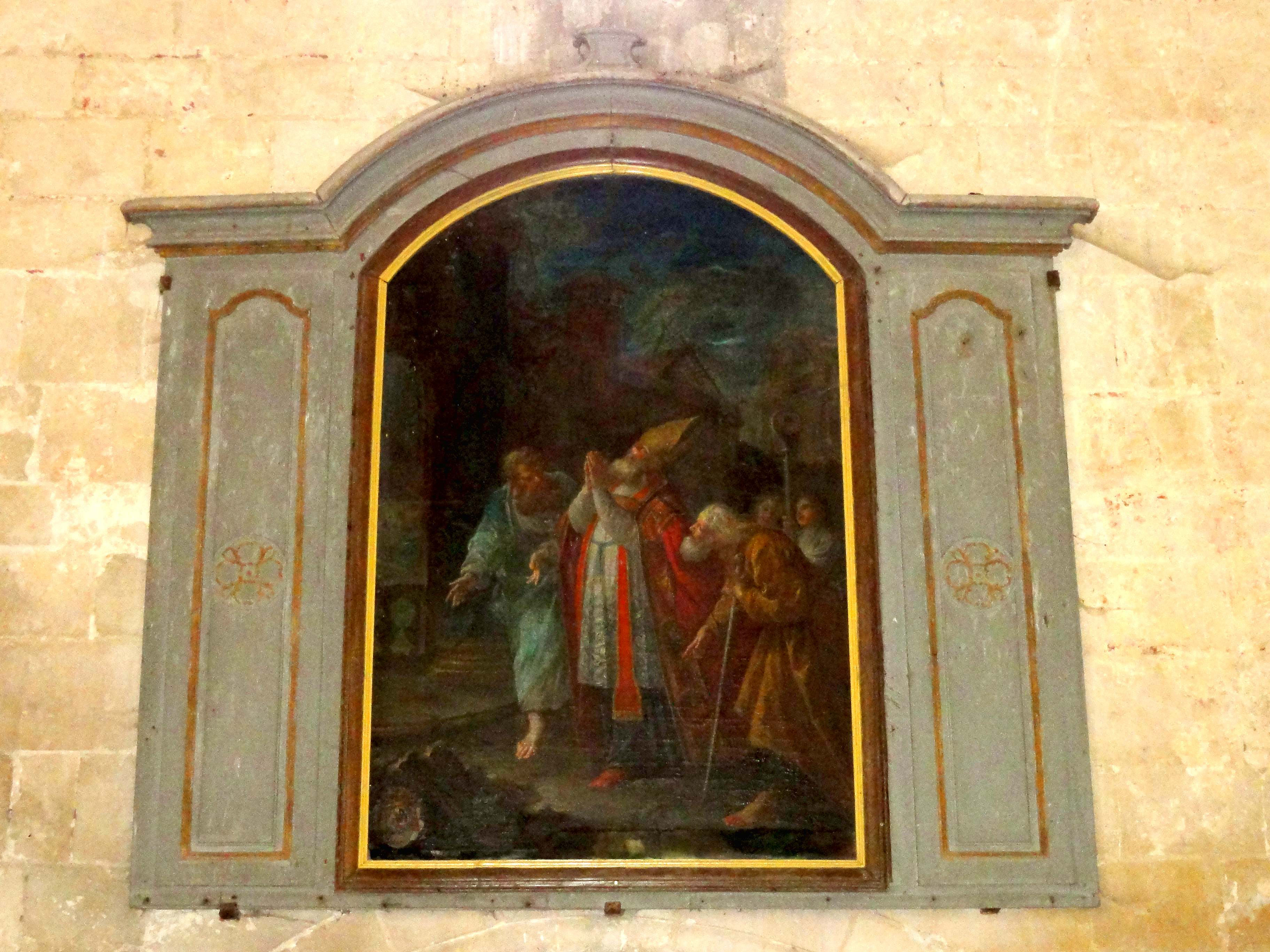 Mobilier de l'église (voir titre).